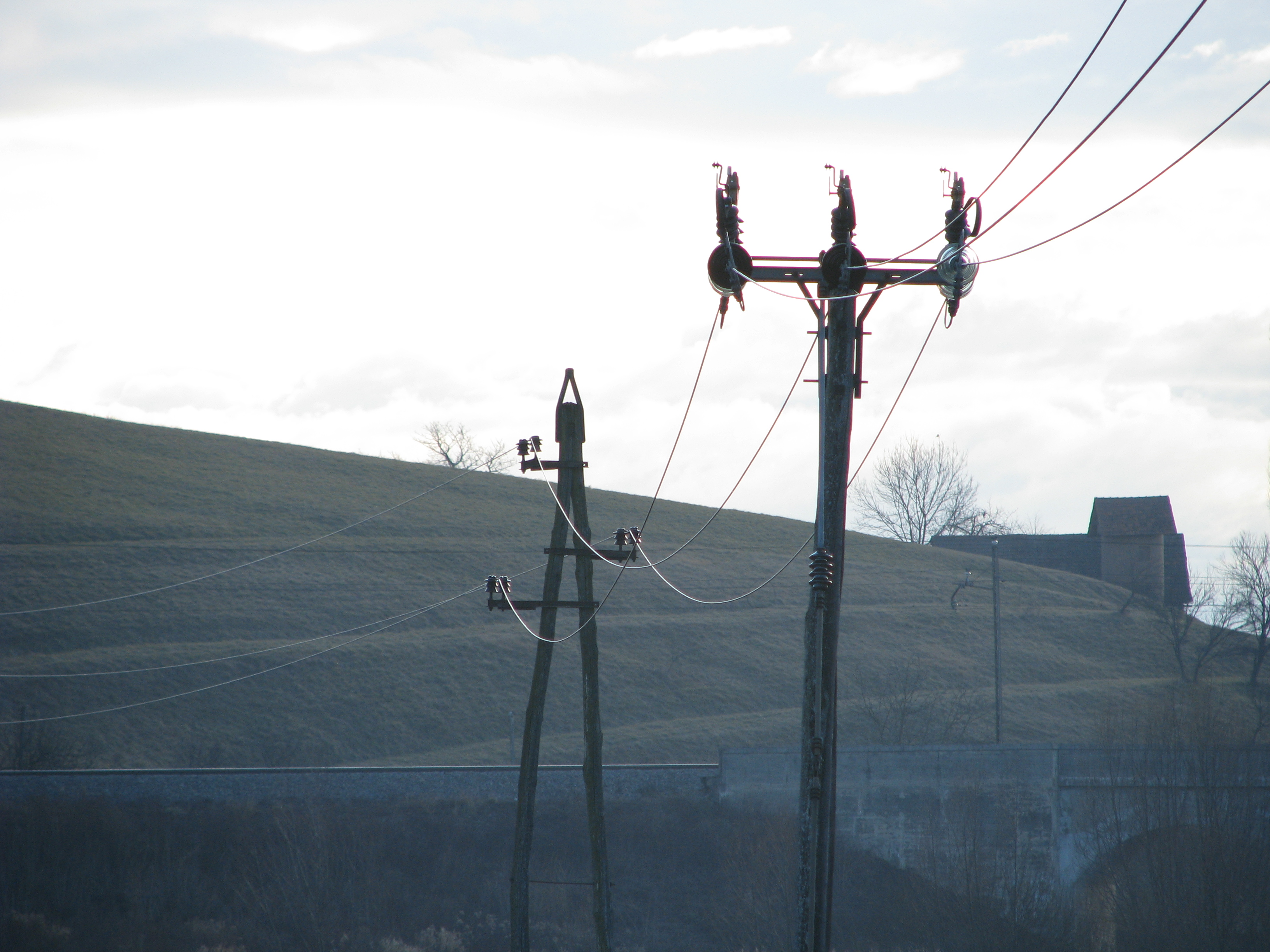 Steber NN omrežja